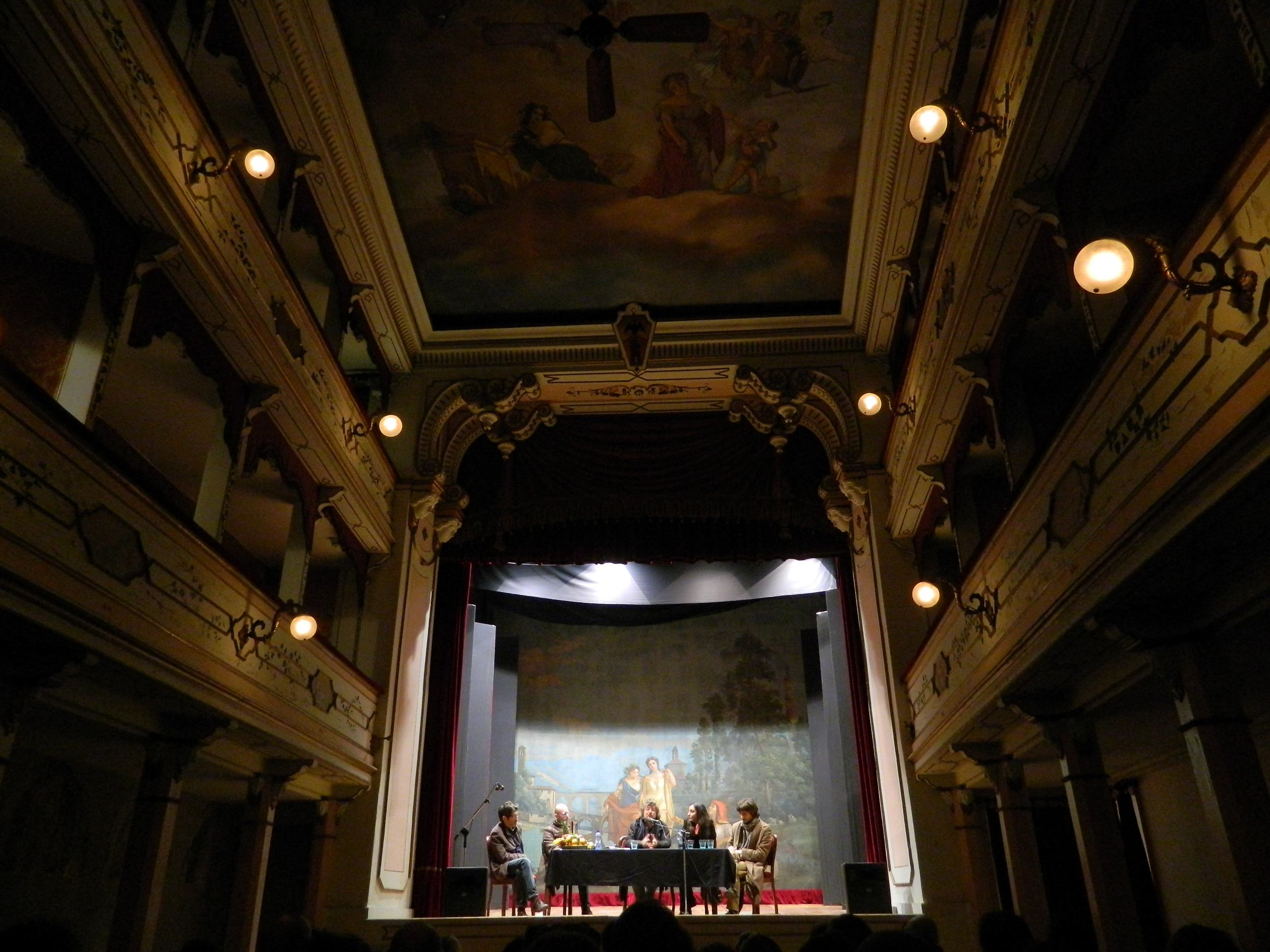 L'interno del teatro sociale di Palazzolo sull'Oglio